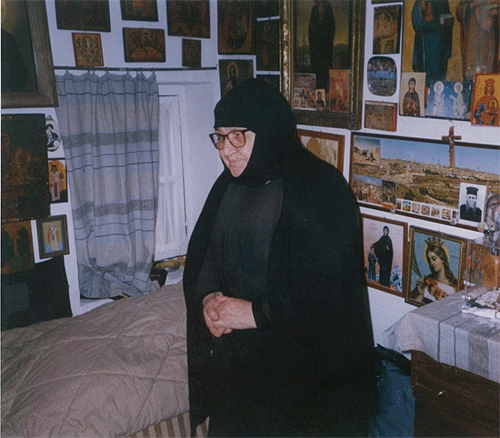 == Άδεια χρήσης == Το παραπάνω αρχείο διανέμεται υπό τις δύο παρακάτω άδειες χρήσης. Μπορείτε να επιλέξετε την άδεια της προτίμησής σας.